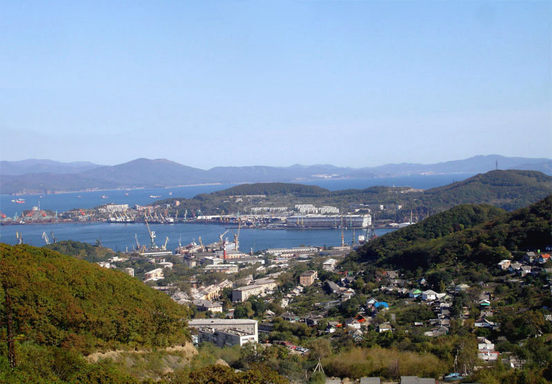 Nakhodka from West Hill